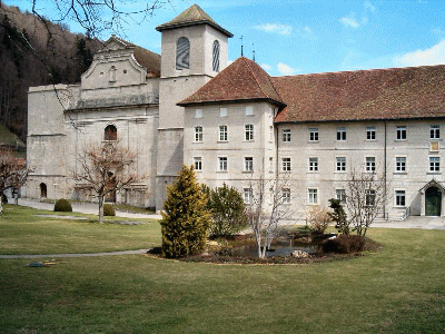 Abbaye Prémontré de Bellelay